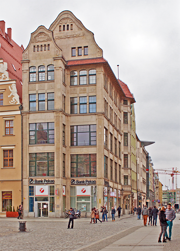 Dawny dom towarowy firmy Ludwig Wittemberg & Co w Rynku we Wrocławiu